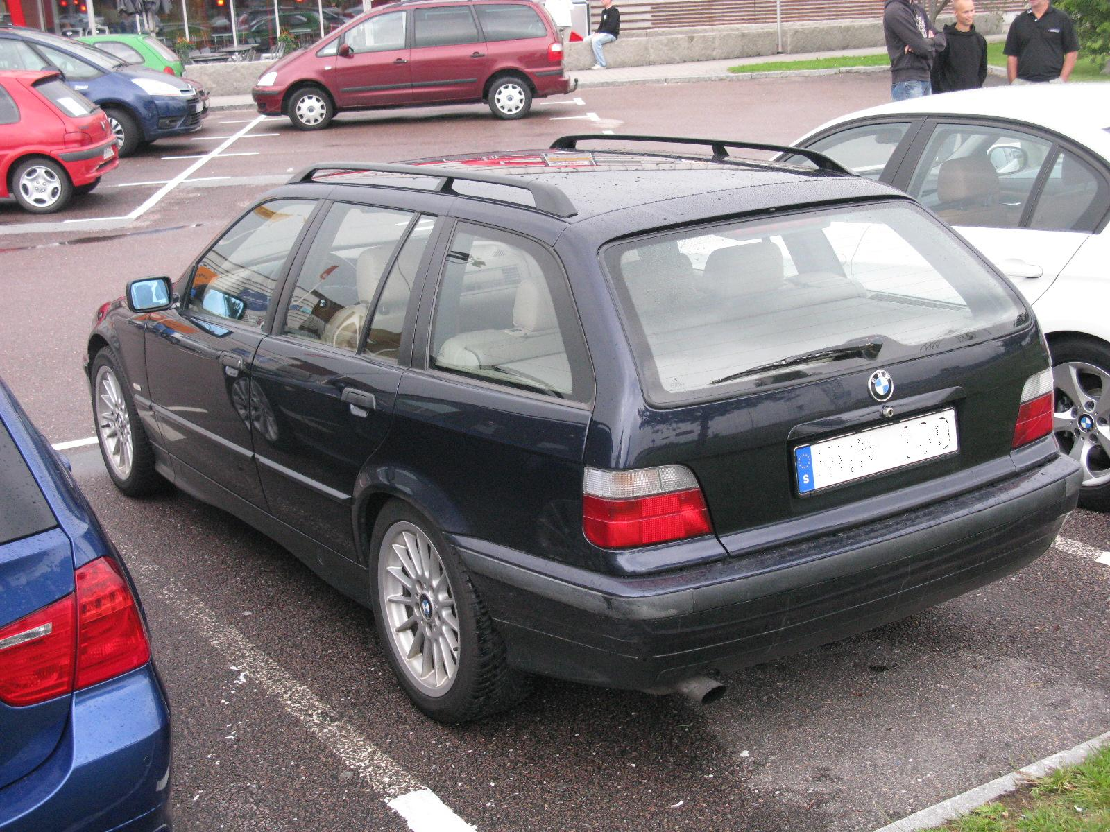 BMW 320i Touring E36